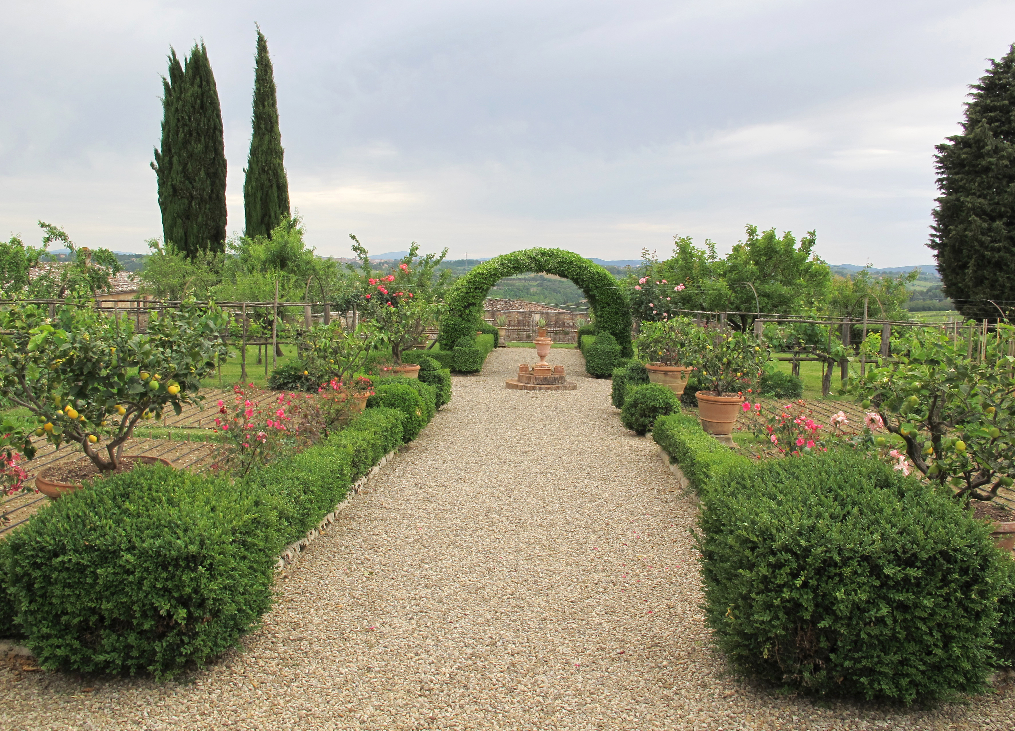 Villa di Geggiano